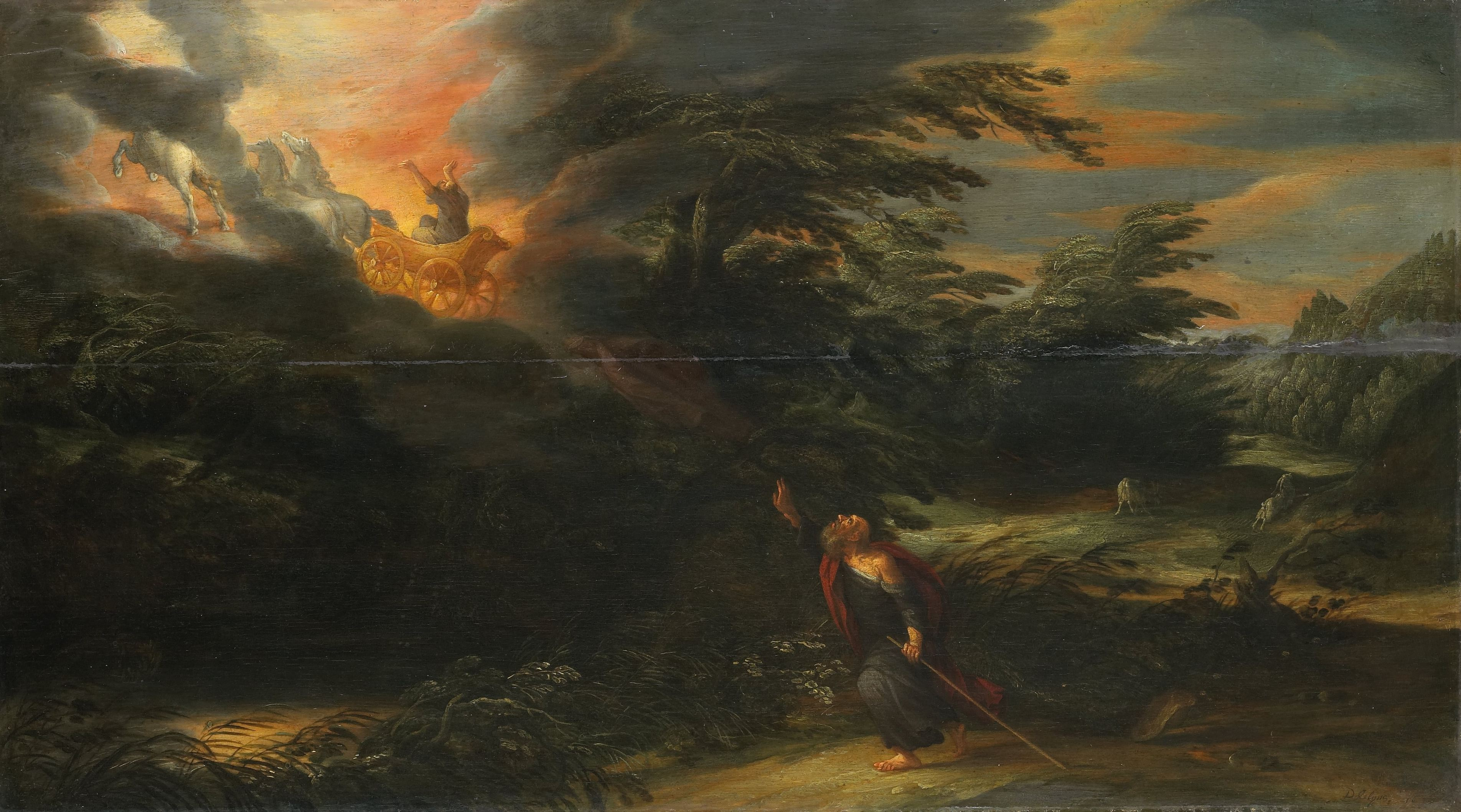 De hemelvaart van Elia. Landschap waarin de profeet Elisa ziet hoe Elia in de vurige wagen naar de hemel rijdt.